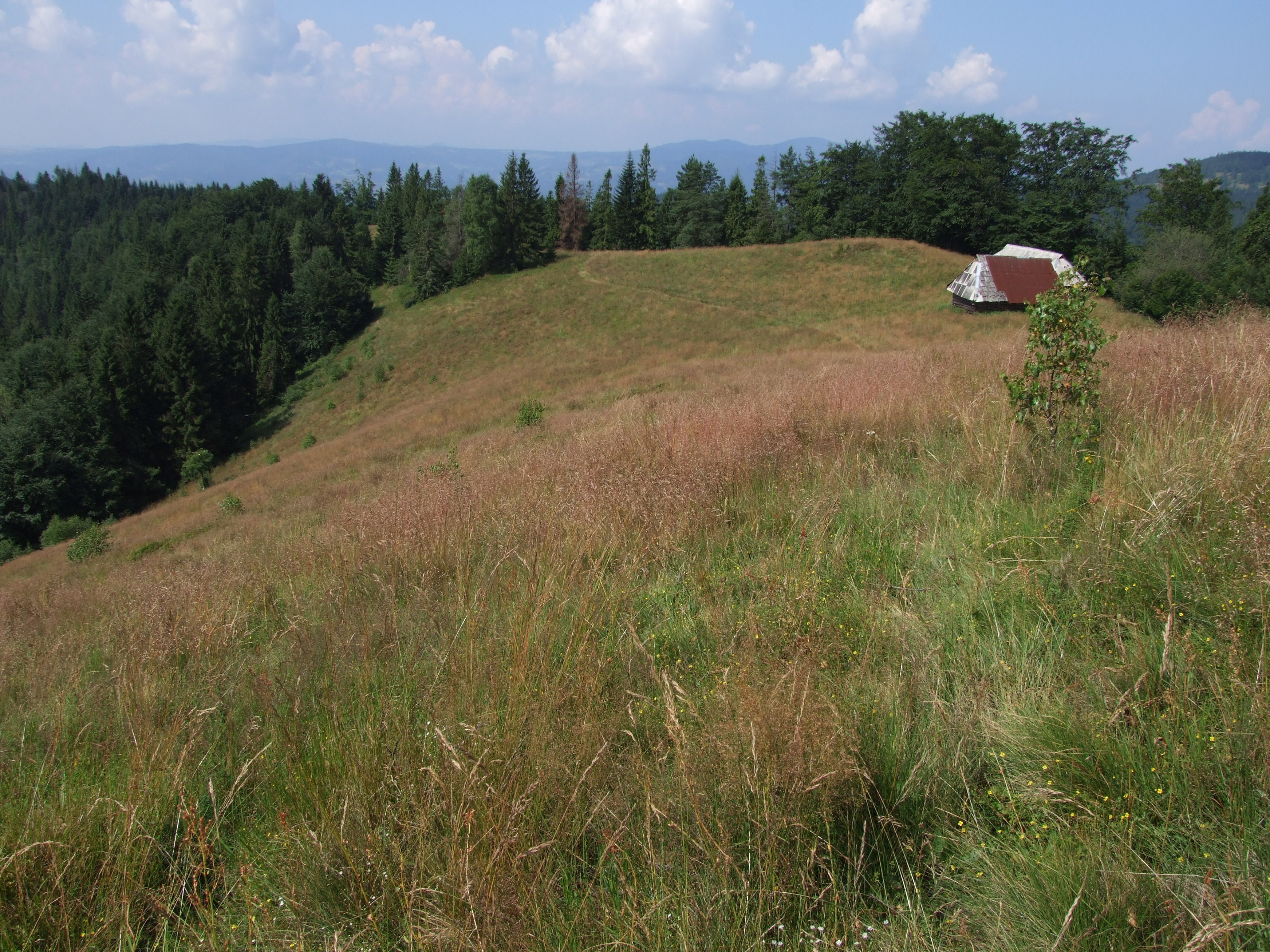 Hala Skotarka w Paśmie Jaworzyny Krynickiej